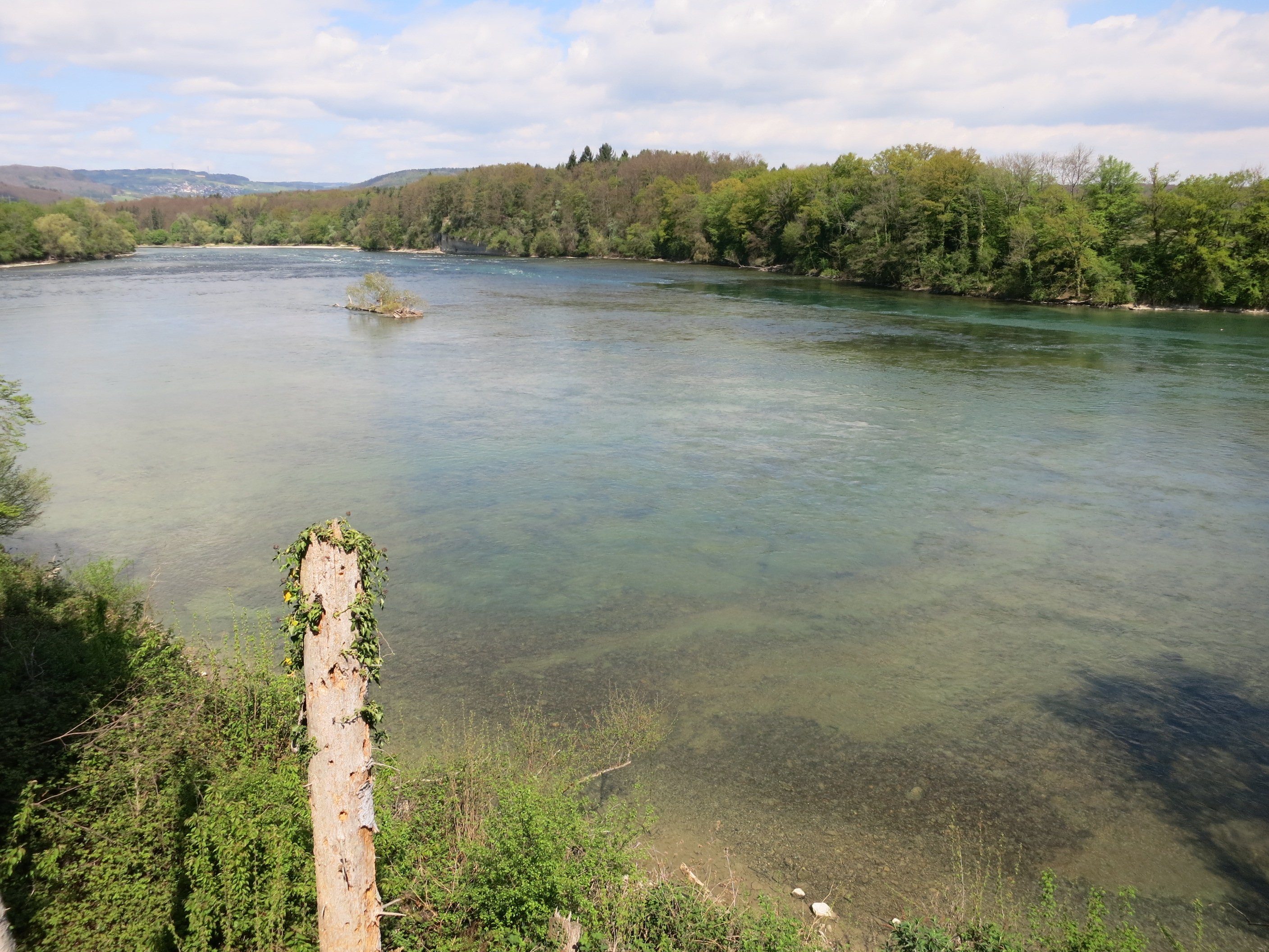 Koblenzer Laufen, Koblenz AG, Schweiz